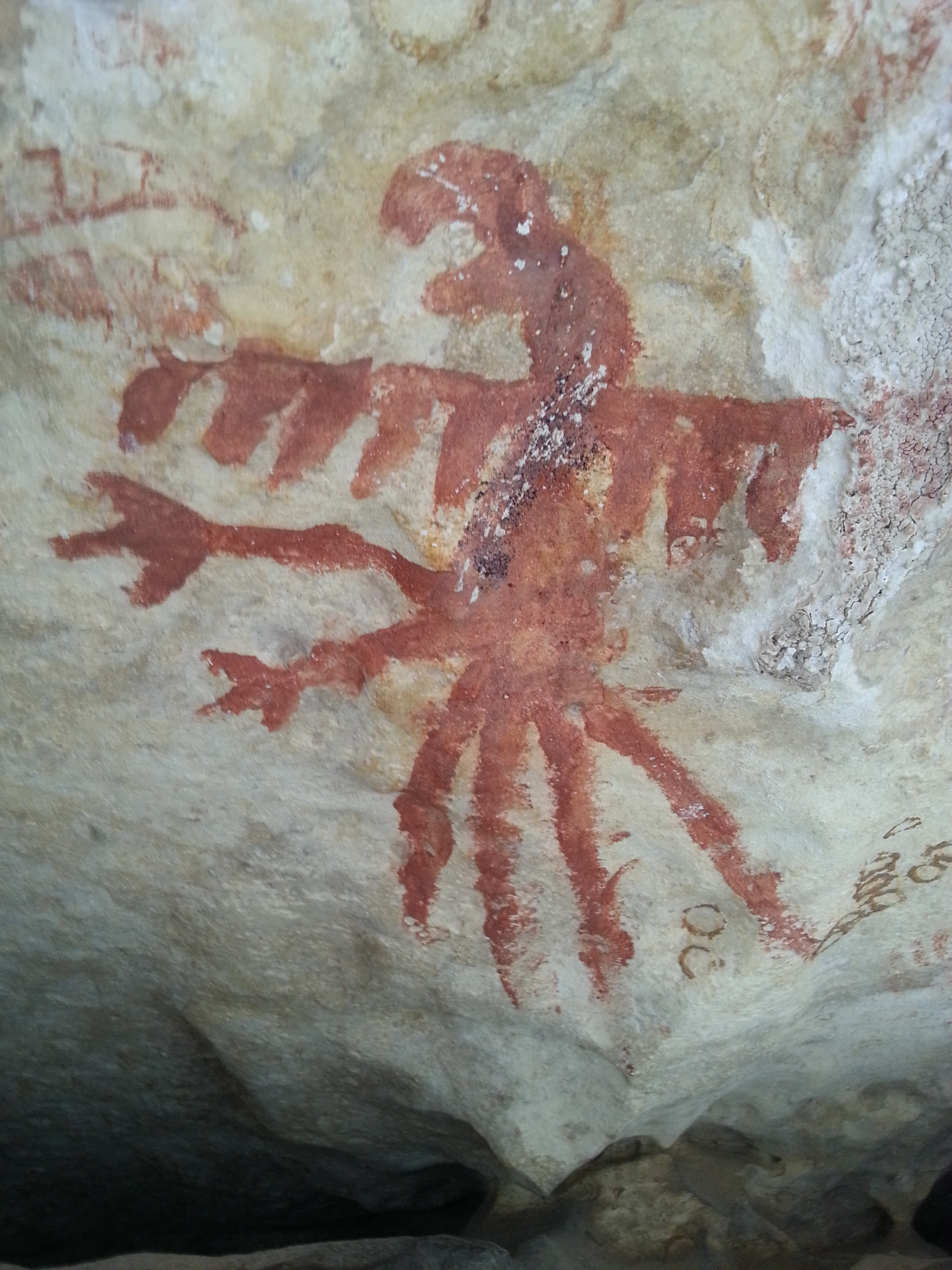 Desenho da arara, famoso desenho rupestre do Lajedo de Soledade, Apodi, Rio Grande do Norte